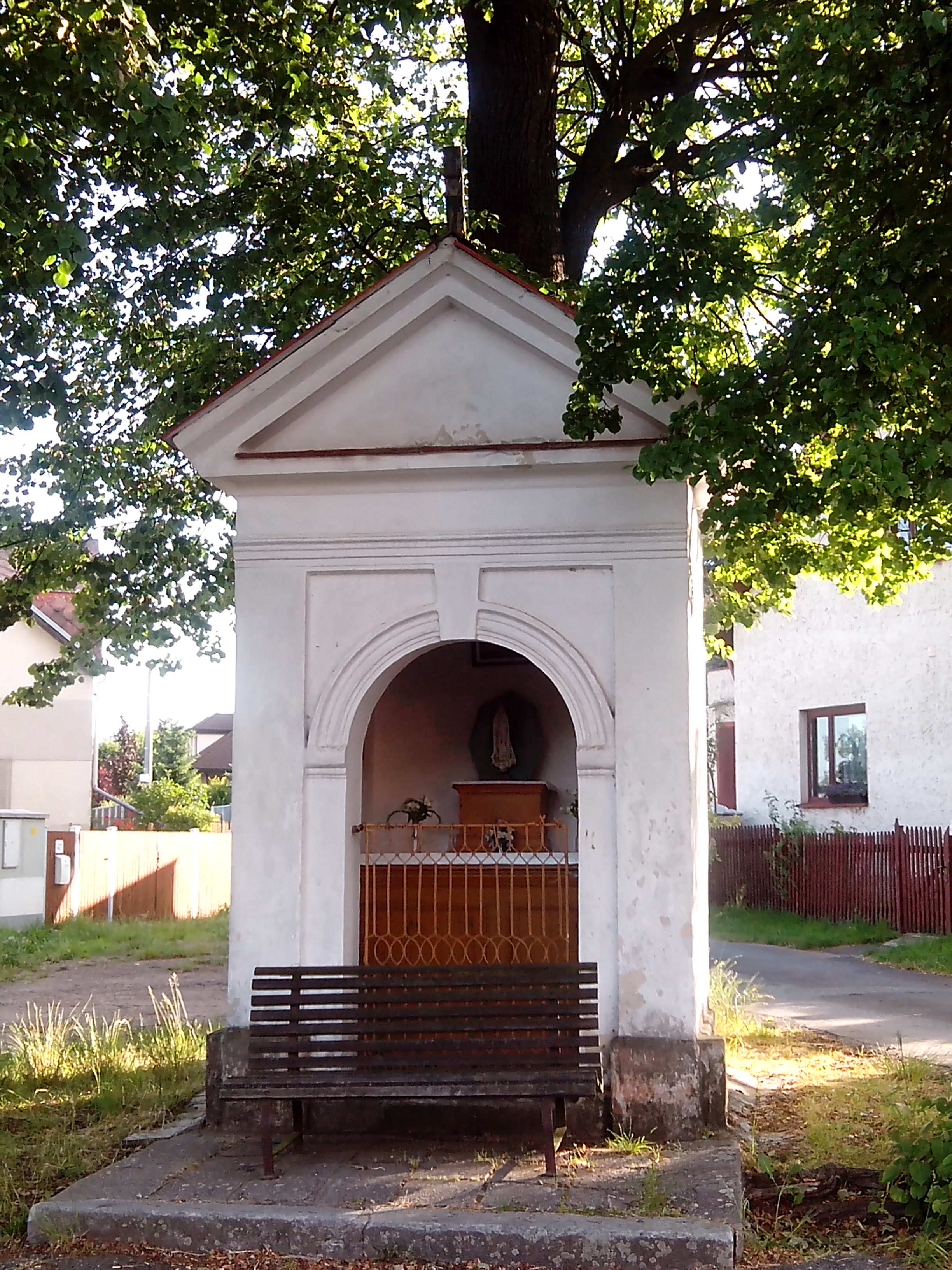 Kaple Nanebevzetí Panny Marie v Červeném Kostelci-Lipkách